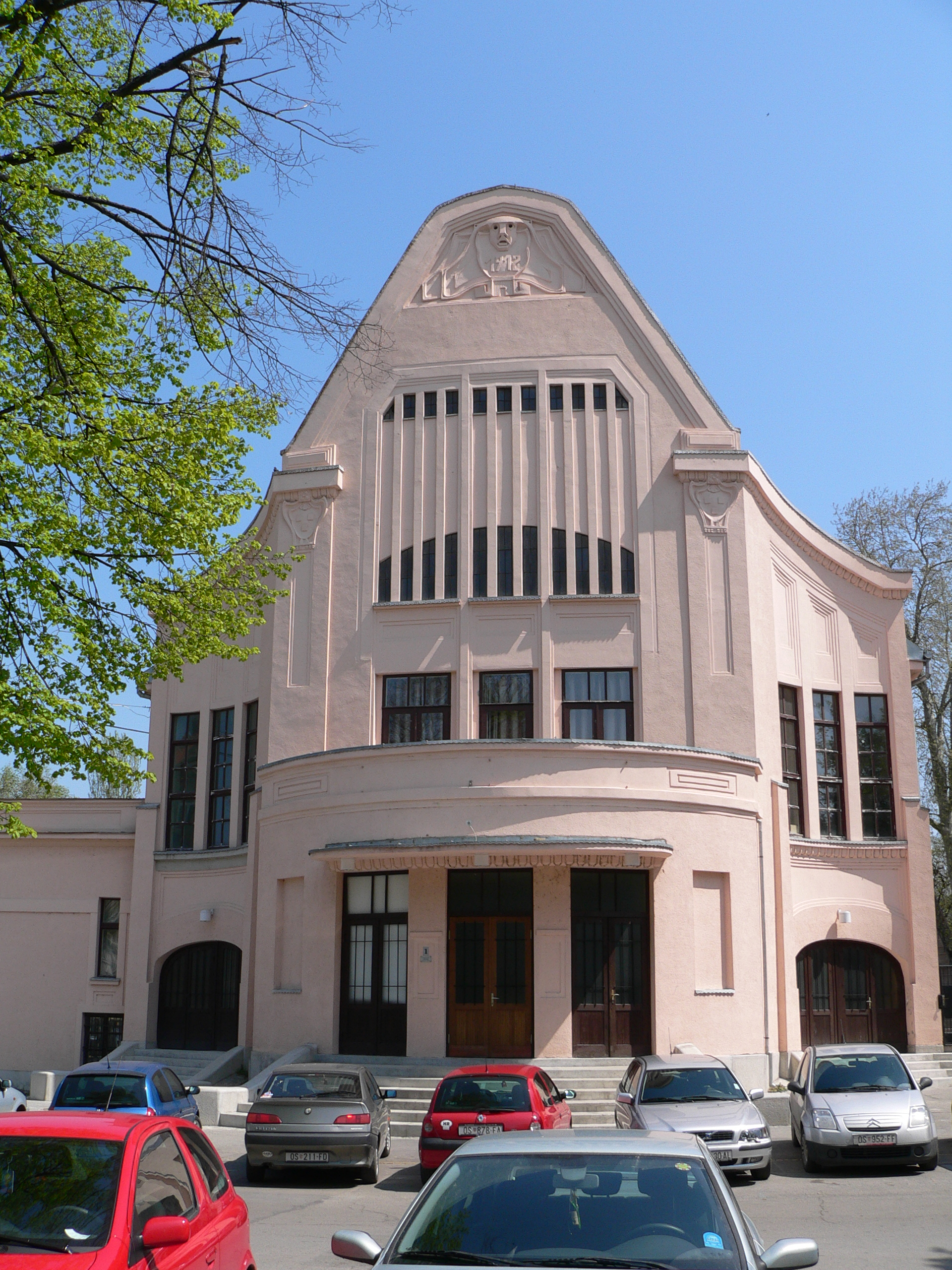 Urania Cinema, Osijek, Croatia. Viktor Axmann, 1912.